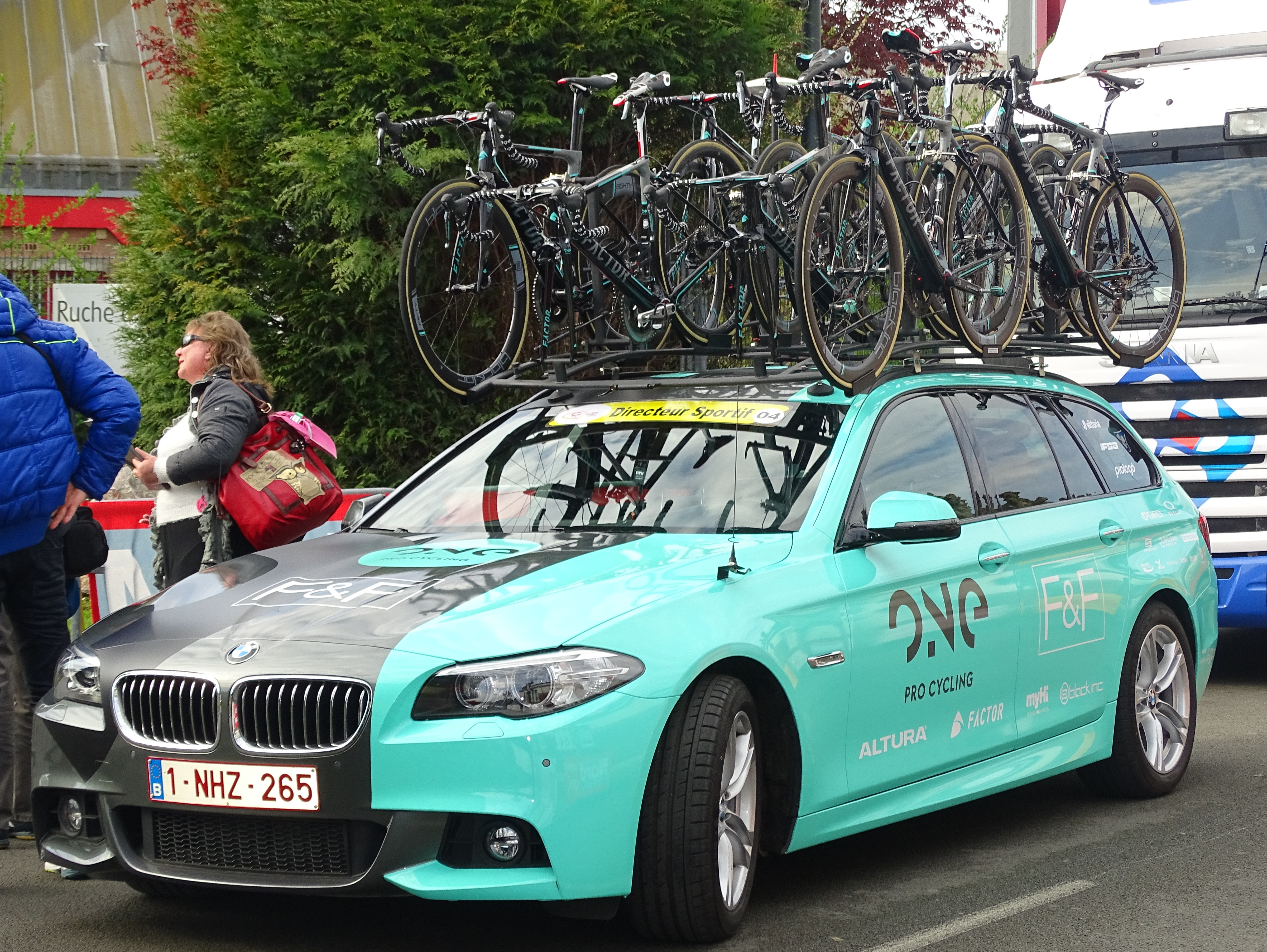 Reportage réalisé le jeudi 14 avril à l'occasion du départ et de l'arrivée du Grand Prix de Denain 2016 à Denain, Nord, Nord-Pas-de-Calais-Picardie, France.